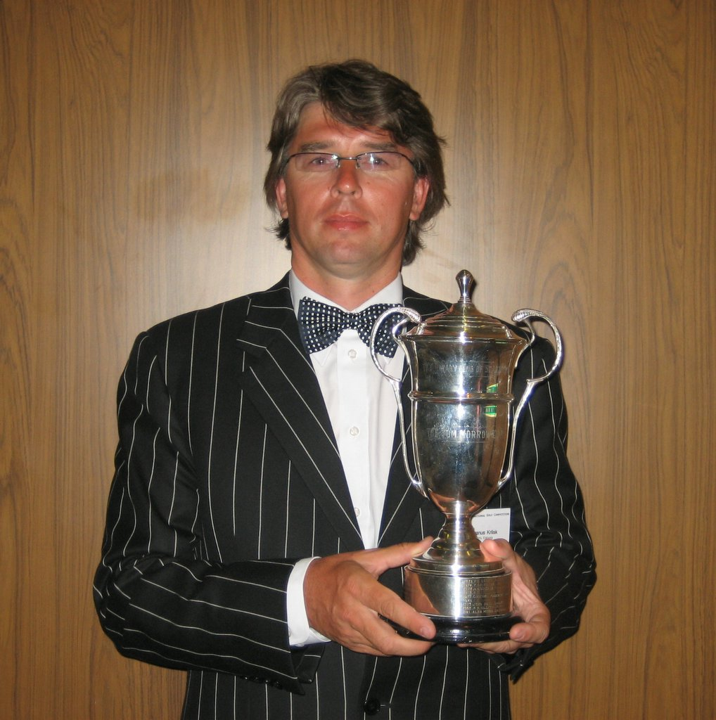 Jaanus Kriisk hoidmas Tom Morrow karikat aastal 2006